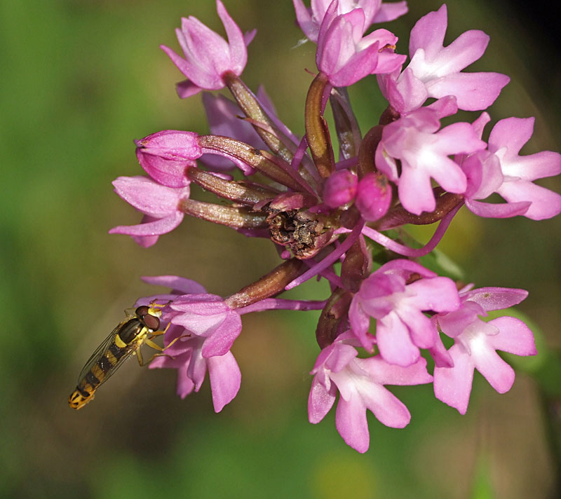 Sphaerophoria scripta (Syrphe porte-plume) butinant Anacamptis pyramidalis. Les Touches de Périgny, 17160